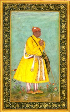 Man Singh I, Mughal Paintings